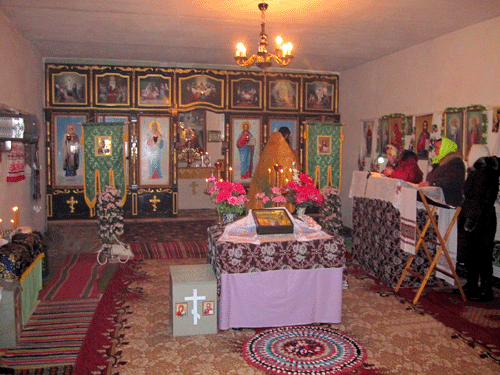 У храмі знаходиться місцевошанована ікона Спасителя, що збереглась зі старої церкви. Коли її принесли до храму, вона була зовсім чорна, але згодом оновилась.